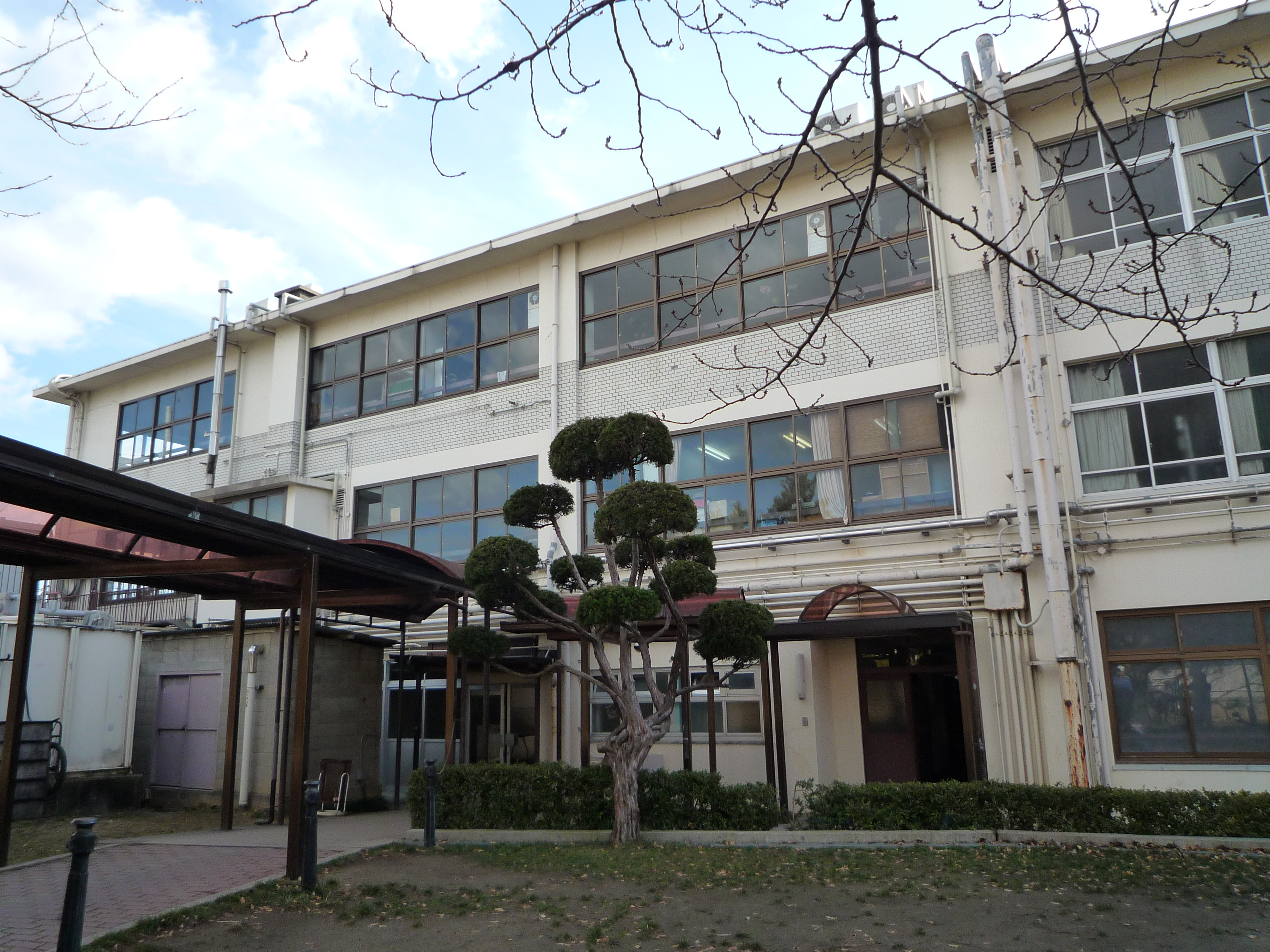 箕面自由学園中学校